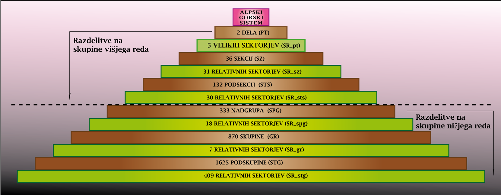 Piramida Soiusa